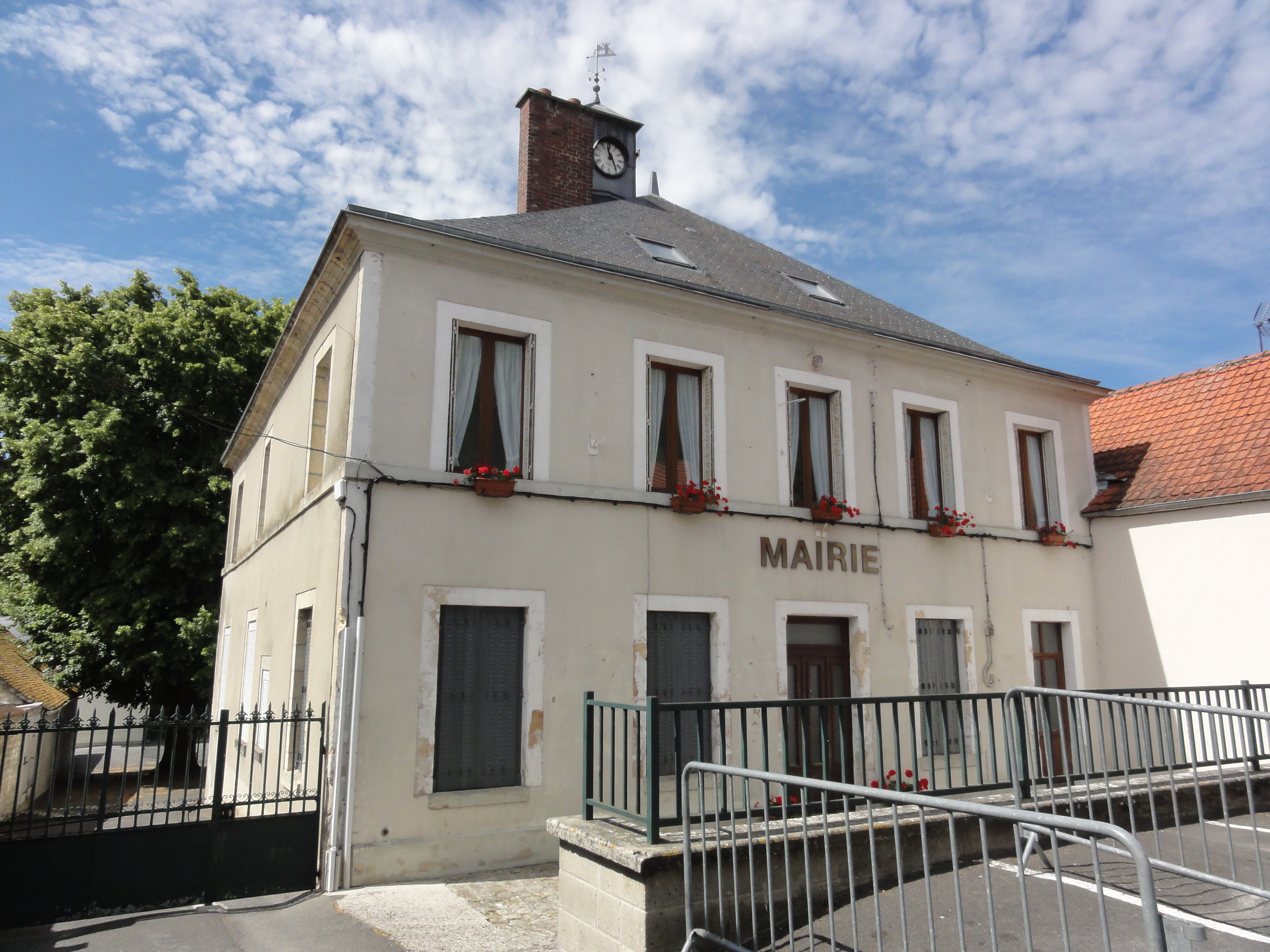 Montaigu (Aisne) mairie